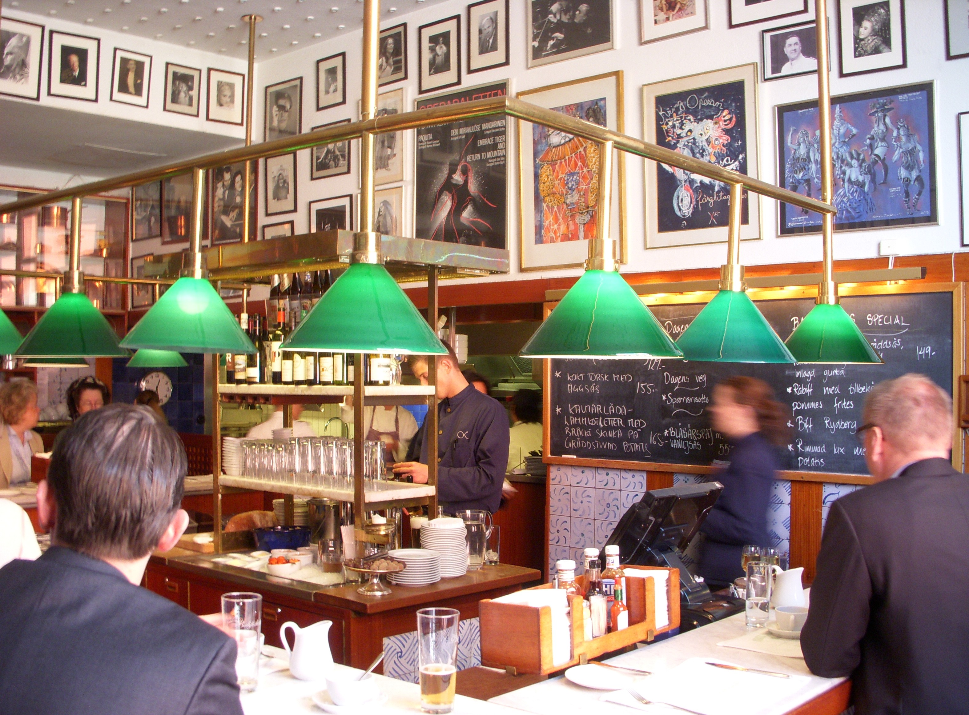 Bakficken på Operakällaren